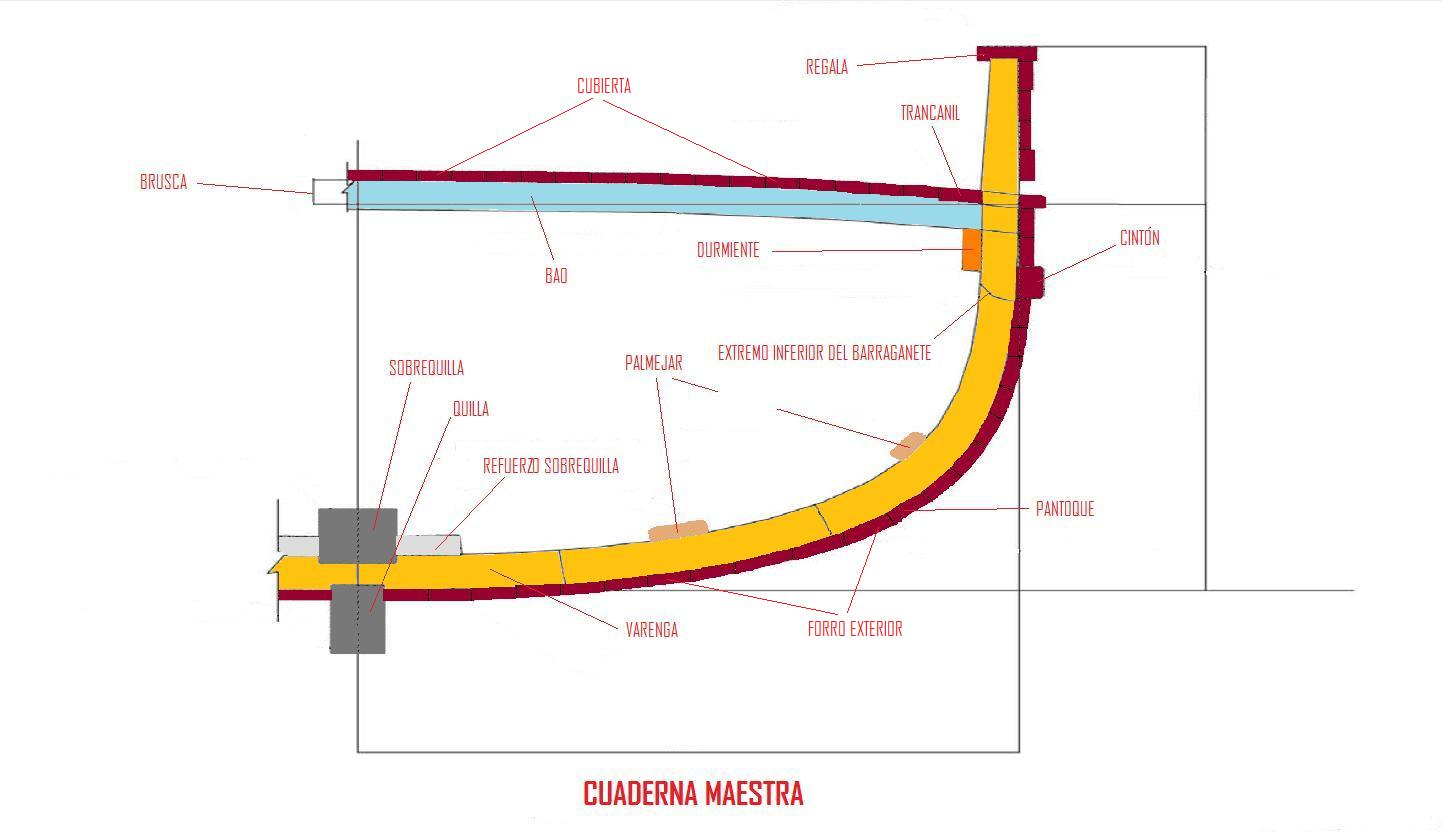 Vista de una cuaderna maestra de un pesquero de madera